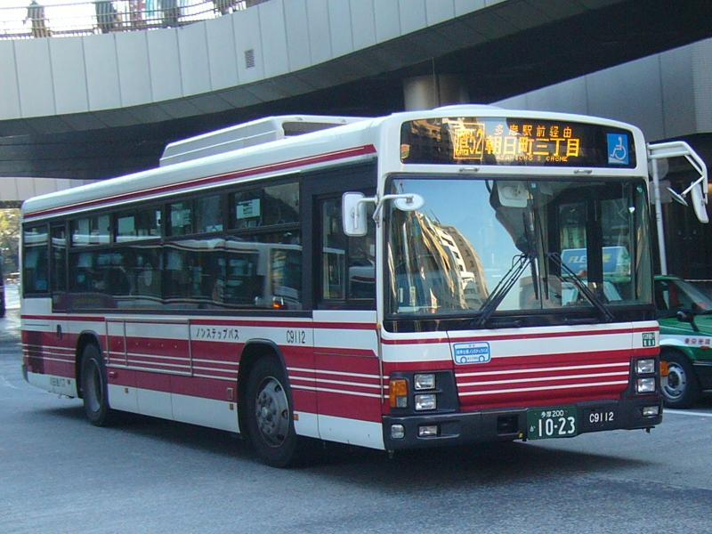 登録番号 多摩200か10-23 小田急バス武蔵境営業所所属 車番C9112 2006年11月9日 三鷹駅前にて撮影